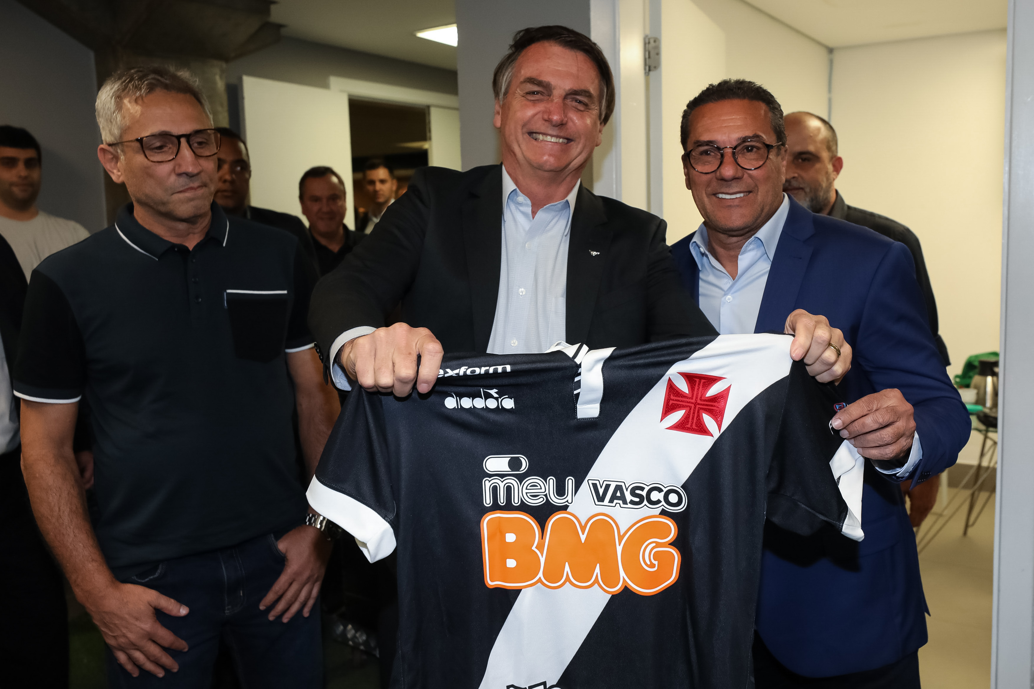 (São Paulo - SP, 27/07/2019) Presidente da República, Jair Bolsonaro, assiste à partida de futebol entre Palmeiras x Vasco da Gama, válida pelo campeonato brasileiro 2019. Foto: Marcos Corrêa/PR